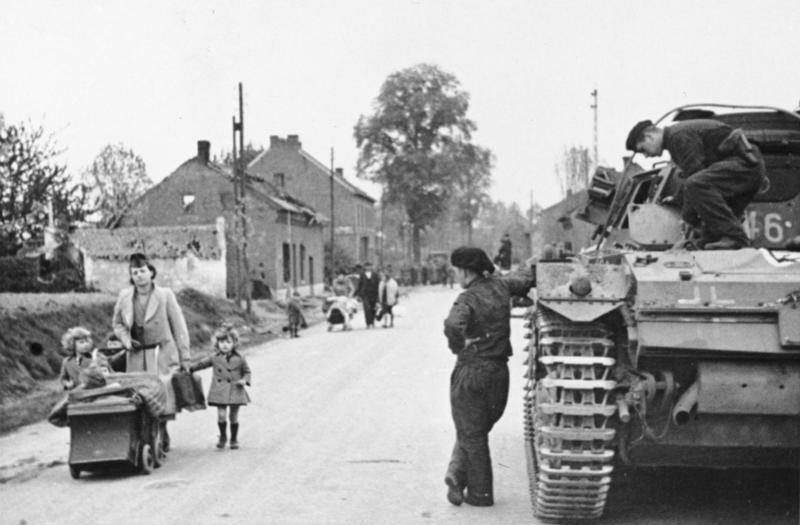 An der Brücke über den Albert-Canal, südlich Veldwzelt. Flüchtlinge und deutsche Panzerkampfwagen [Panzer III oder Panzer IV]. 11. 5. 40